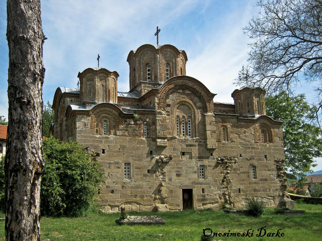 Свети Ѓорѓија Село Нагоричани